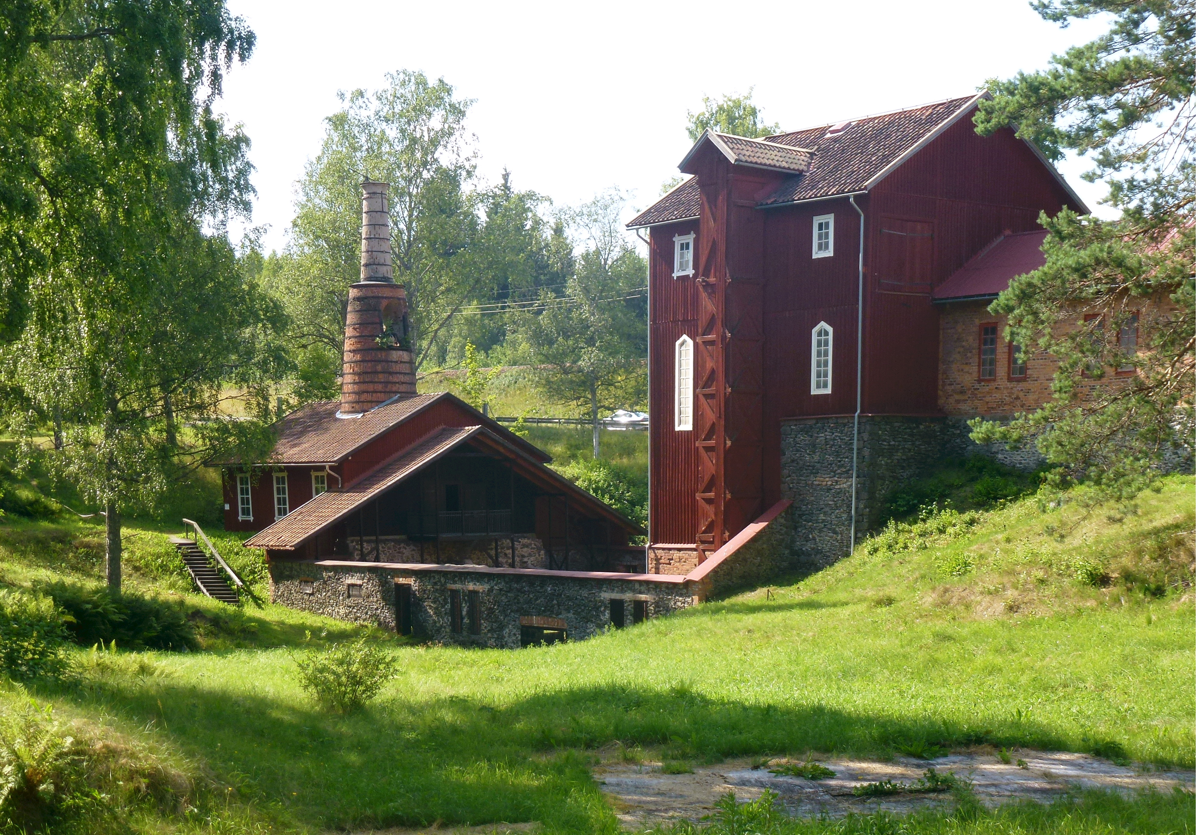 Klenshyttan